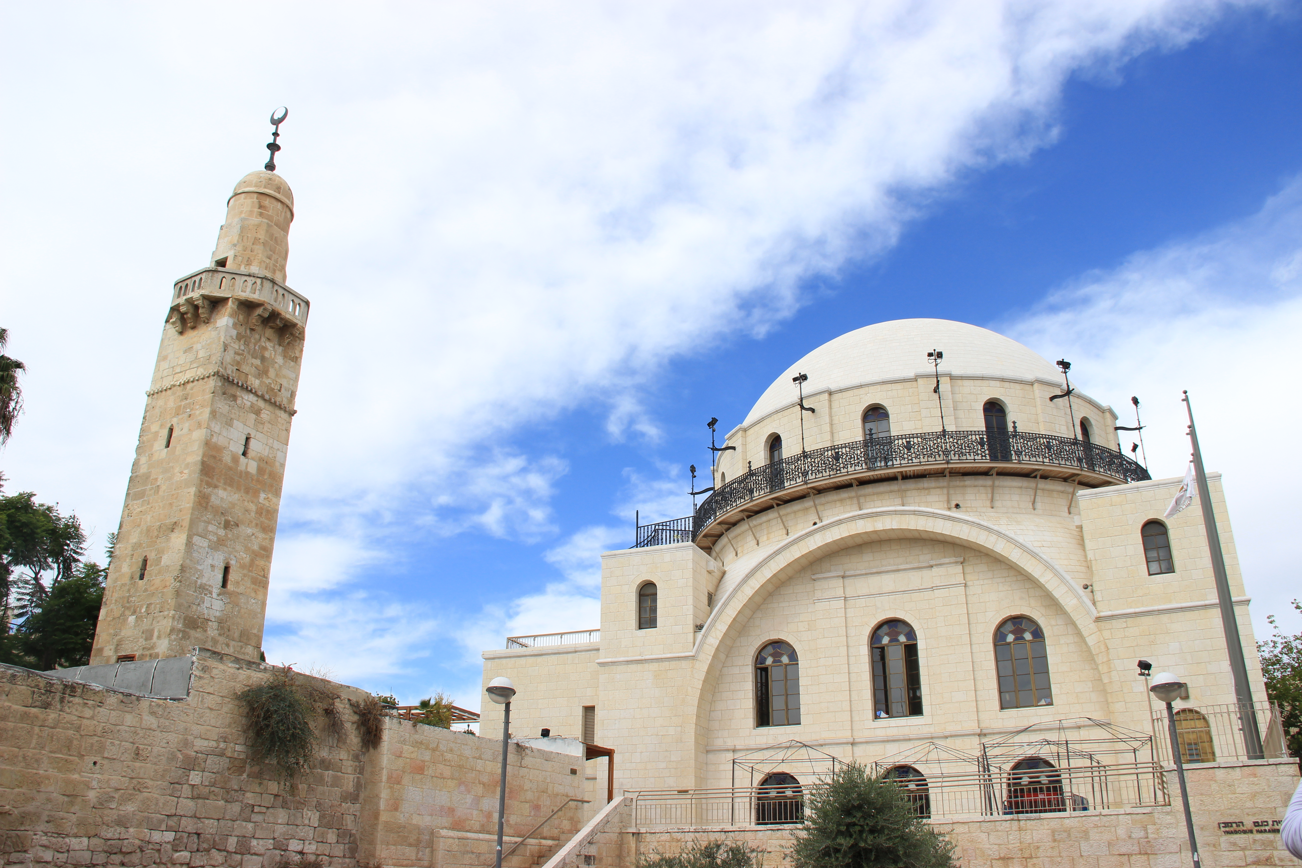 מוזיאון חצר היישוב הישן הוא מוזיאון אתנוגרפי ברובע היהודי בעיר העתיקה בירושלים המשקף את אורח החיים המסורתי של אנשי "היישוב הישן" במאתיים השנים שקדמו לנפילת הרובע היהודי במלחמת העצמאות.